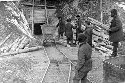 Goldmine at Kolyma Gulag, Siberia